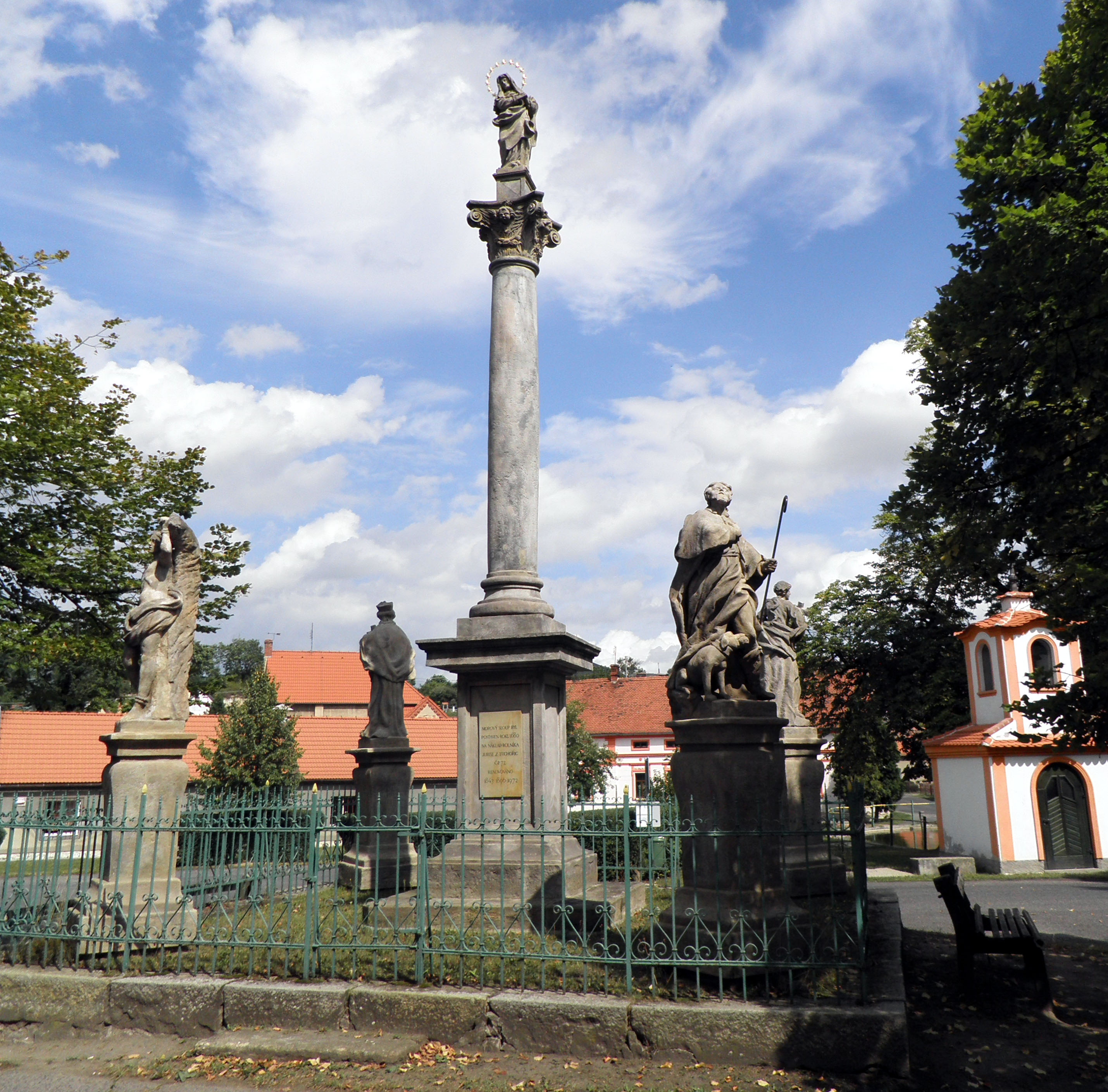 Sloup se sochou Panny Marie, Morový sloup (Tuchořice), náves, Tuchořice